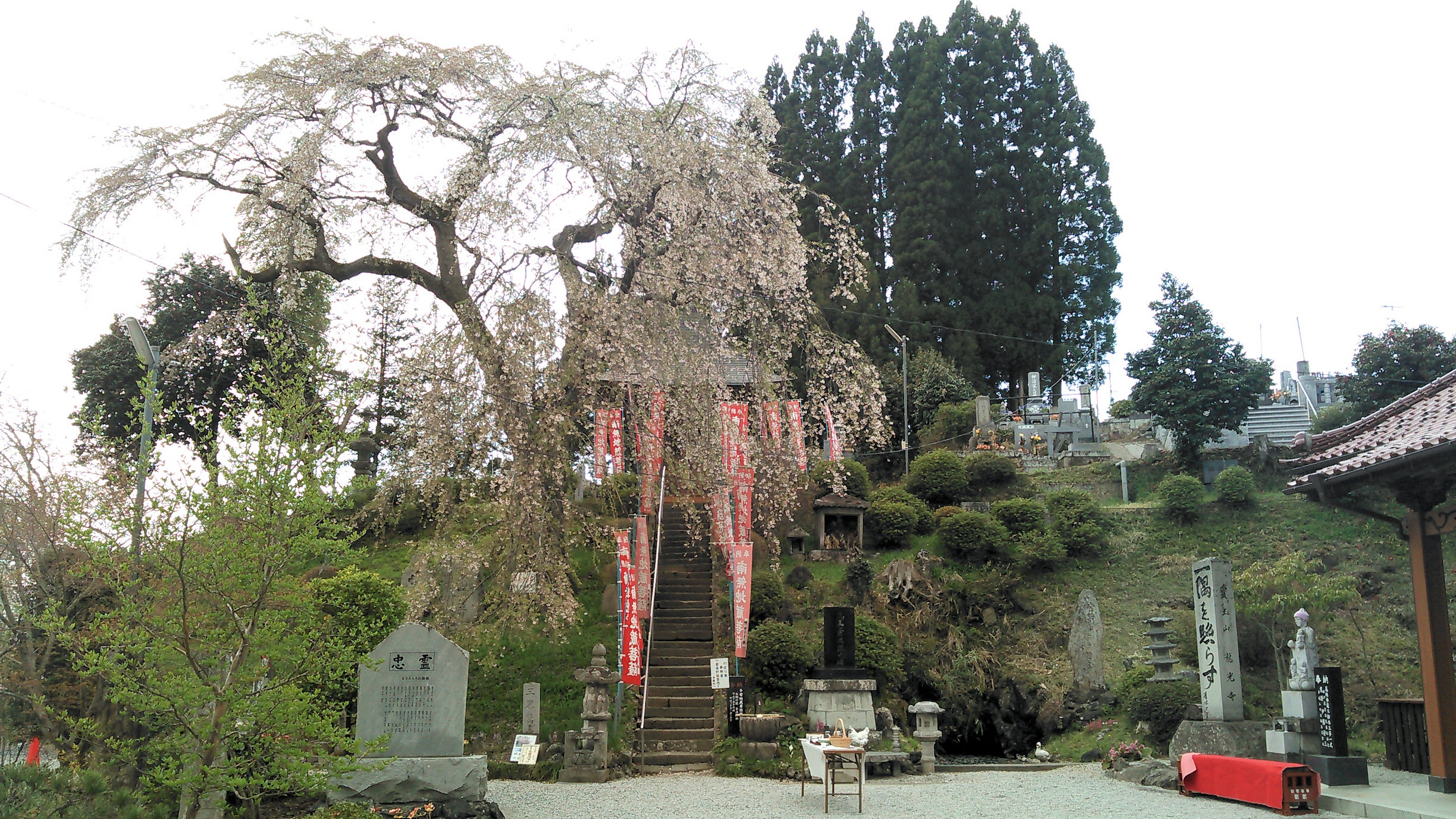 郡山市 龍光寺 地蔵菩薩堂 付近